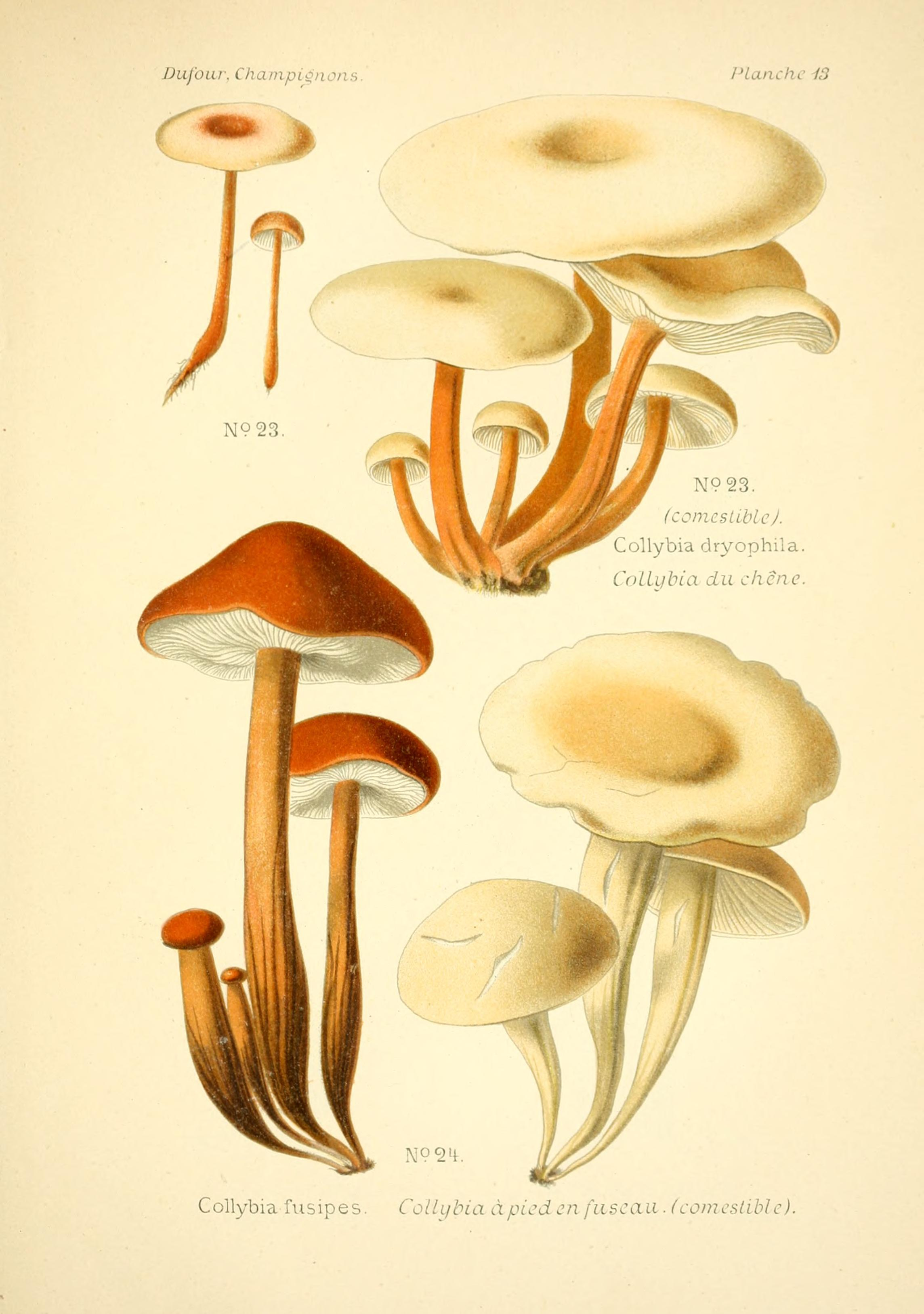 Atlas des champignons comestibles et vénéneux.